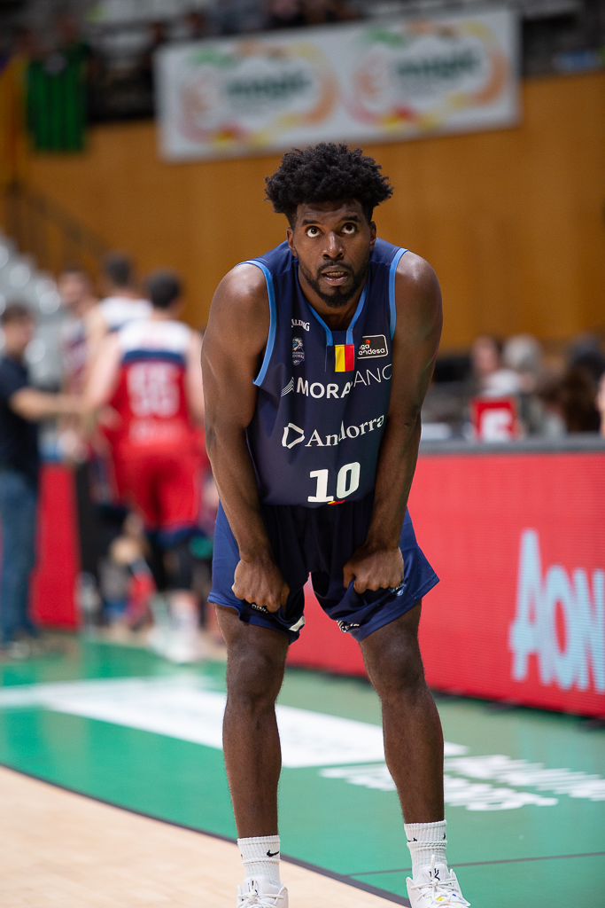 Frantz Massenat en un partido de la Liga Catalana 2019 en el Olímpico de Badalona.